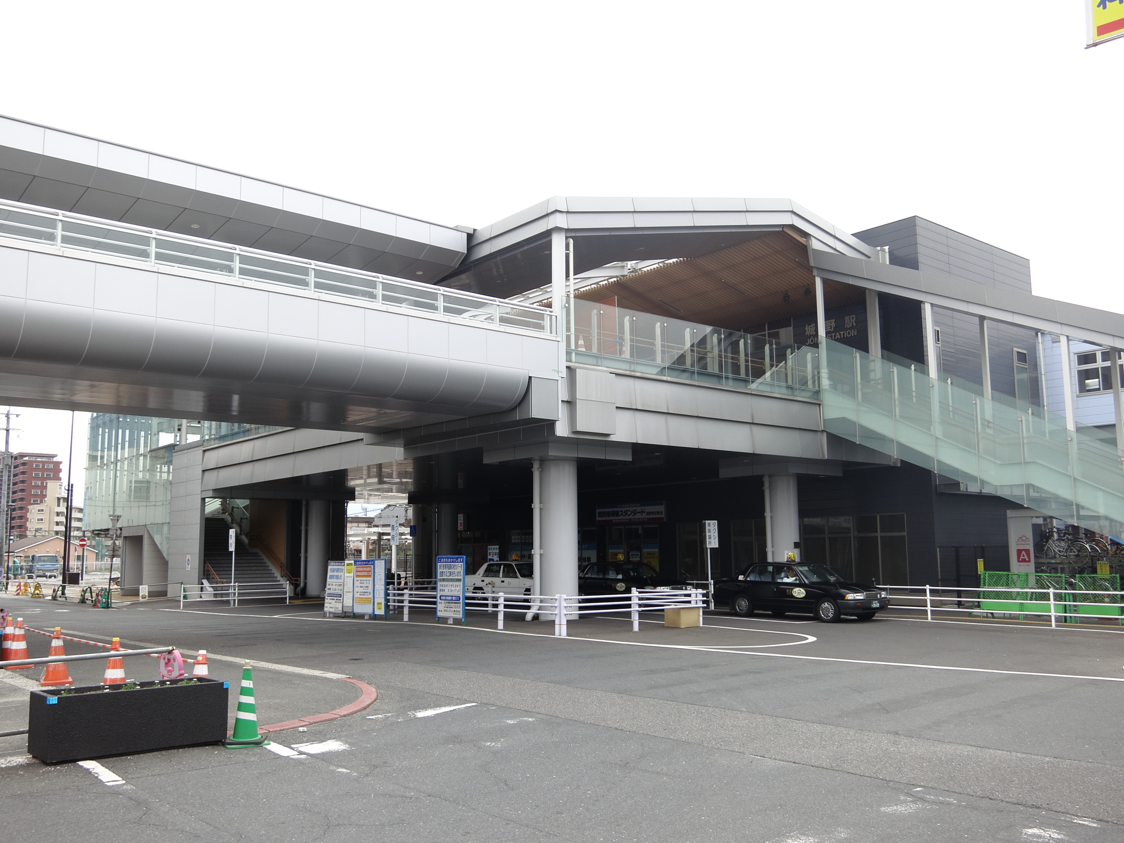 駅舎（2015年3月13日）